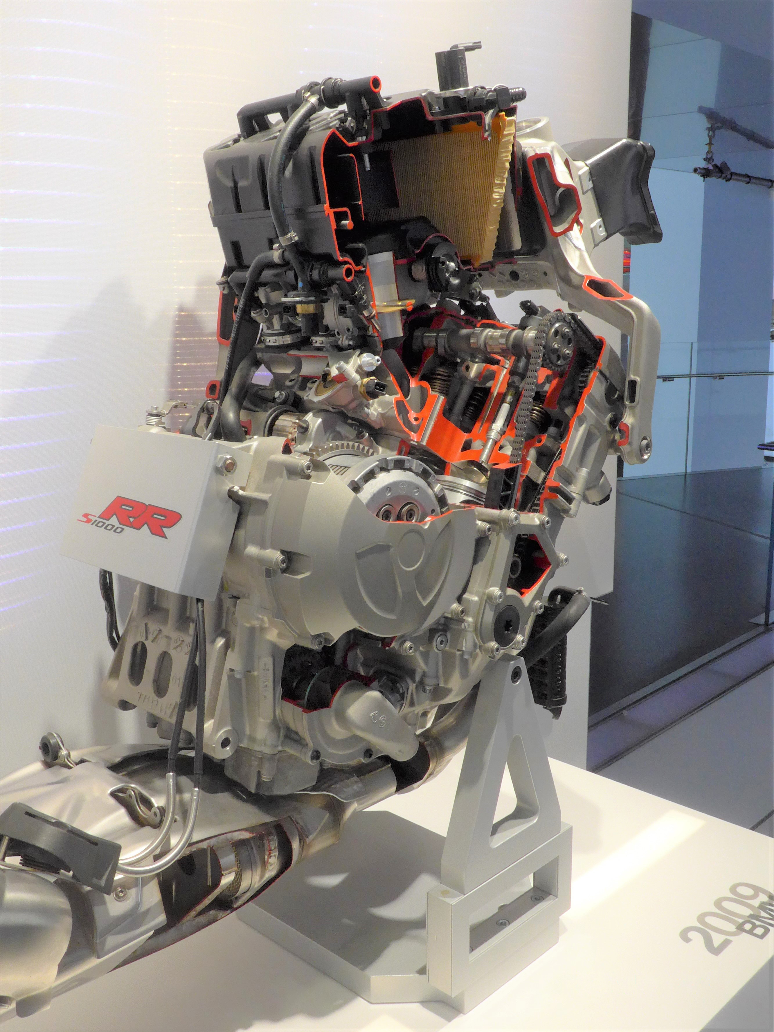 im BMW Museum